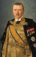 ban Ivan škrlec lomnički